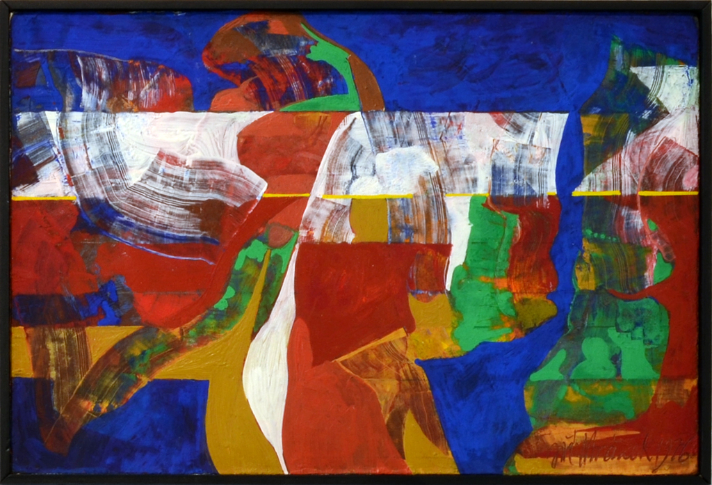 Jiří Mrázek, Hladiny, akryl, sololit, 16x24 cm, 1976